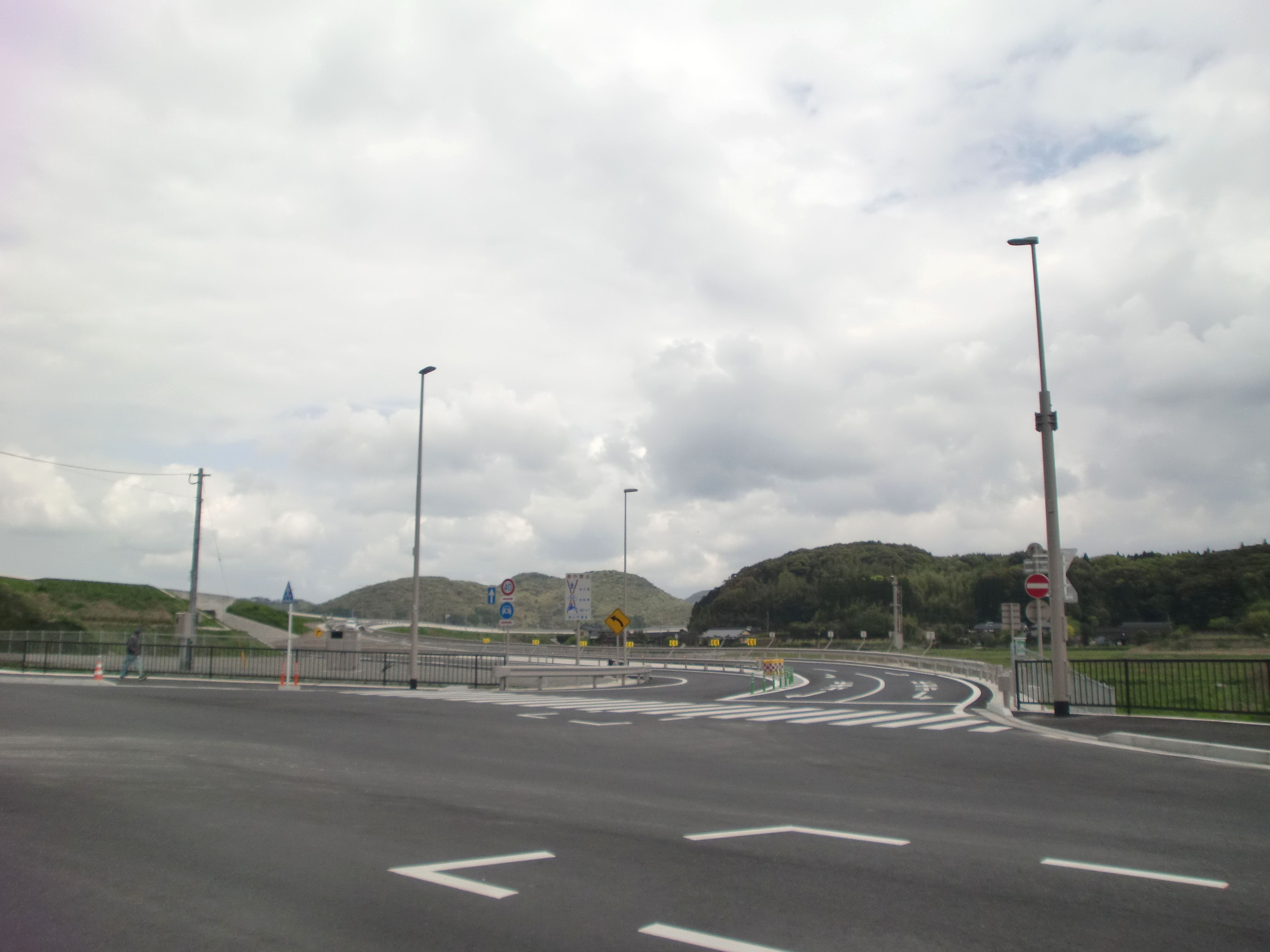 薩摩川内高江インターチェンジの熊本方面出入口